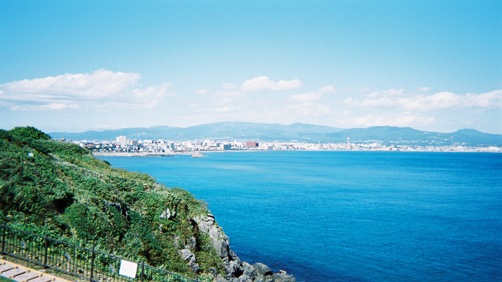 函館市立待岬から函館市街を望む。